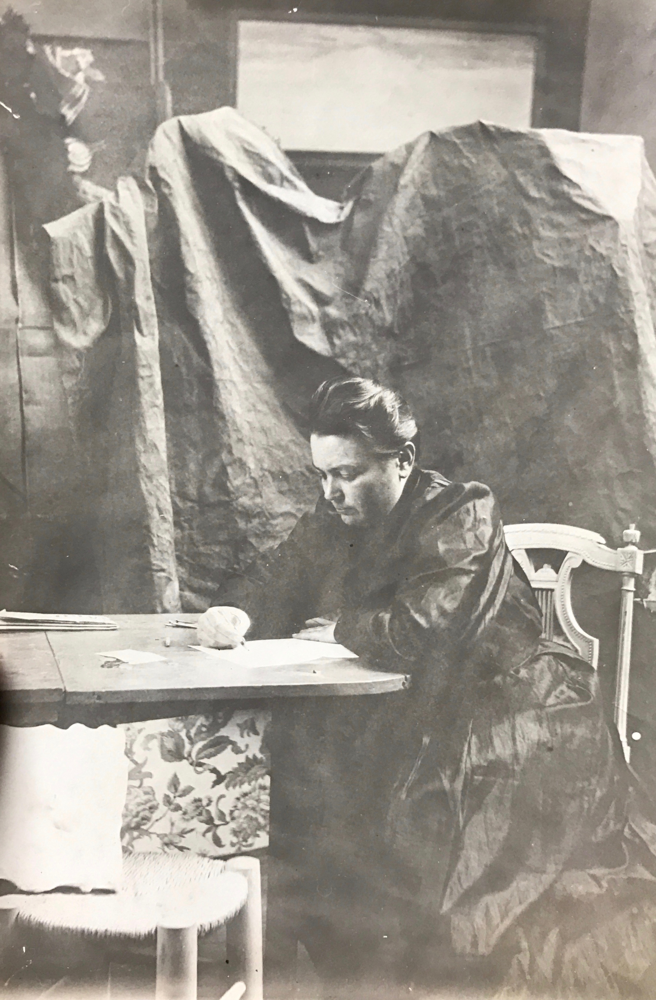 Hildur Meijer i sin ateljé